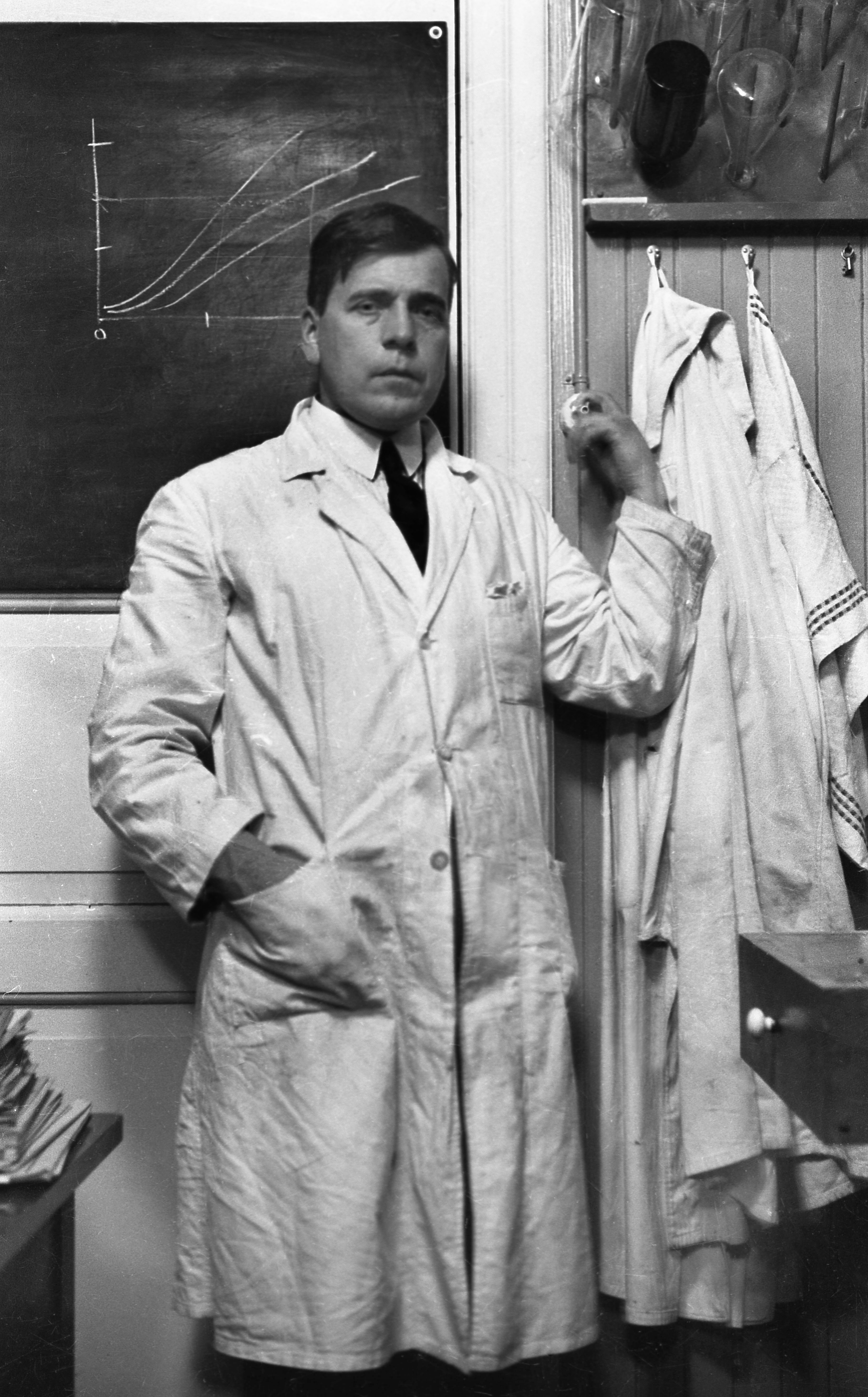 Harald Renbjør i kjemilaboraratoriet ca.1933. Foto: Renbjør/Levanger Museum